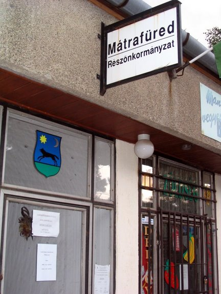 Mátrafüred részönkormányzat